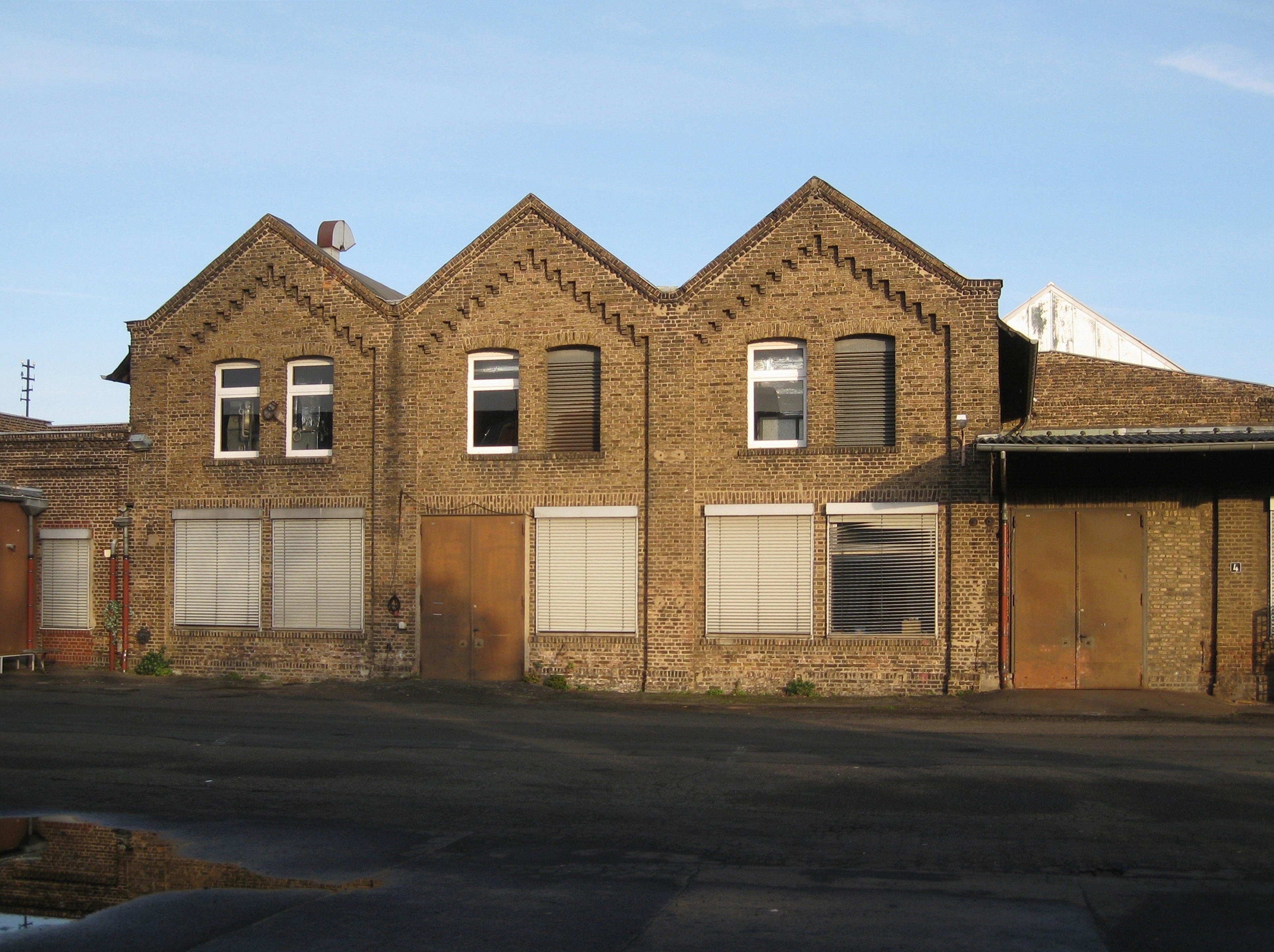 Deutschland, Bonn-Beuel, Siegburger Straße 42 (Bushaltestelle Pantheon Beuel): Werkstattgebäude auf den als Baudenkmal geschützten Fabrikanlagen einer ehemaligen Jutefabrik (gegr. 1868). Seit 1981 ist das Gelände im Besitz der Stadt Bonn. Zum Zeitpunkt der Aufnahme war das Bonner Theater (Schauspiel & Oper) Nutzer des Hallenkomplexes mit seinen Schauspielhallen; genannt „Halle Beuel“. Dort sind neben Probe- und Aufführungsbühnen auch Verwaltungsbüros, Werkstätten für Bühnenbau, Kostümschneiderei, Maskenbildnerei und Lager untergebracht. Für Publikumsaufführungen wurden drei Hallen genutzt: die eigentliche Halle Beuel, das Lampenlager und der Alte Malersaal. Auf dem Gelände verfügt auch die Freiwillige Feuerwehr Beuel über Garagen mit Einsatzfahrzeugen und ein Büro.